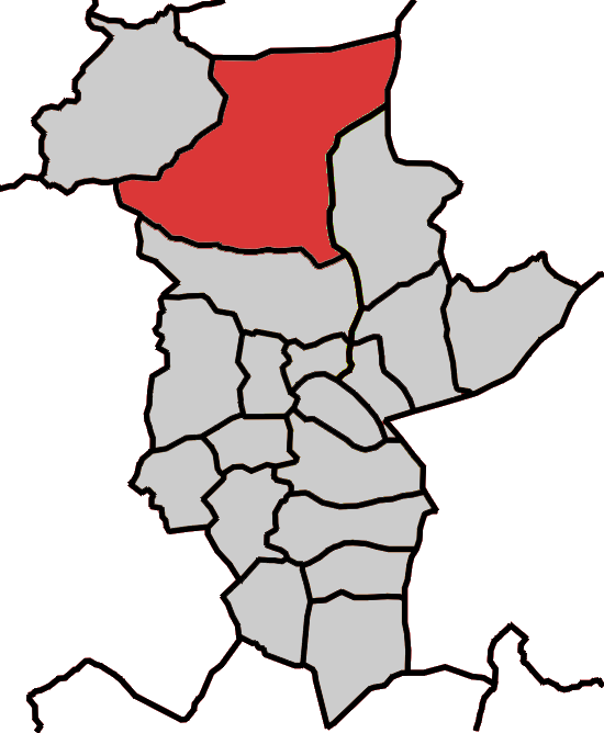 Situación da parroquia de Labrada no concello de Abadín